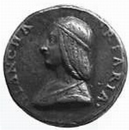 Médaille représentant Bianca Riario par Niccolò Fiorentino (XVIème siècle).